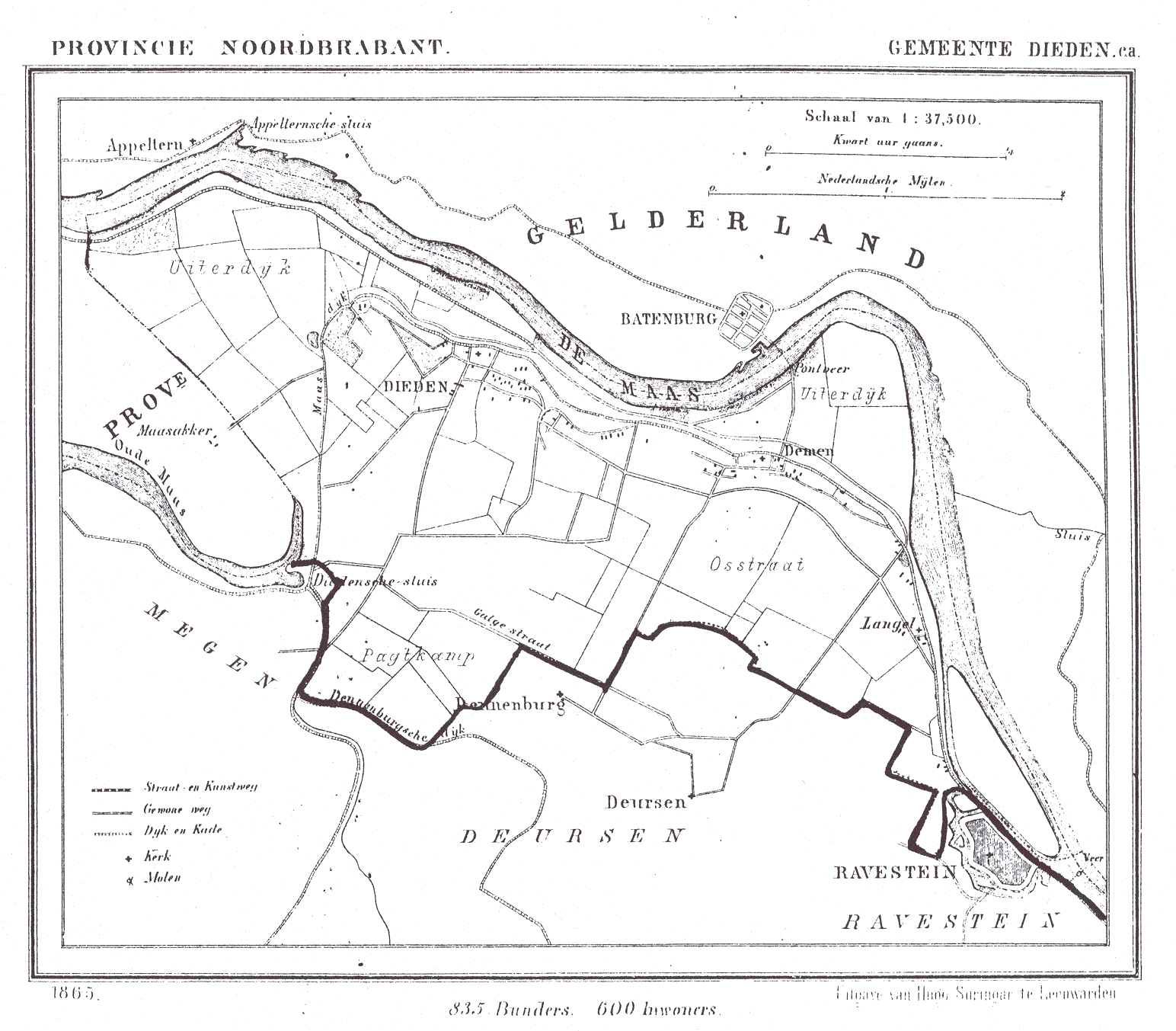 Nederland, Noord-Brabant, Gemeente Dieden